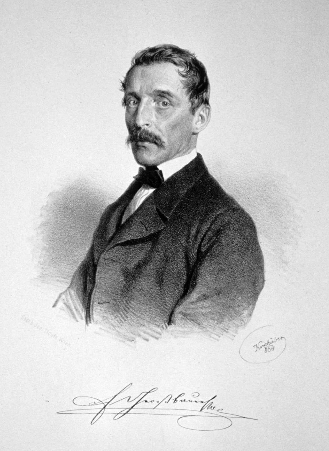 Franz Grossbauer, Ritter von Waldstätt (1813-1887) Forstmann Lithographie von Josef Kriehuber, 1864